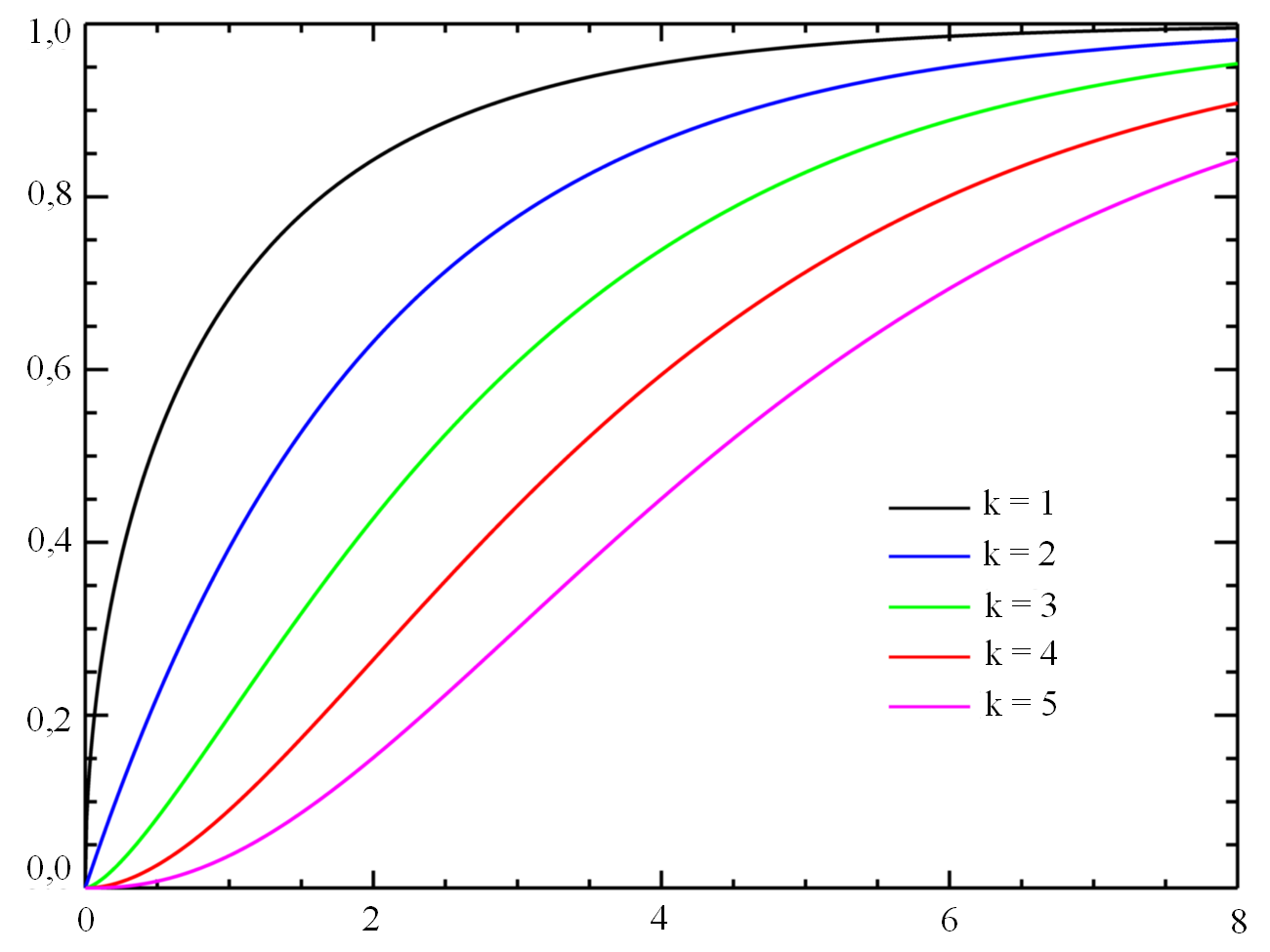 Zbirna funkcija verjetnosti porazdelitve hi-kvadrat.